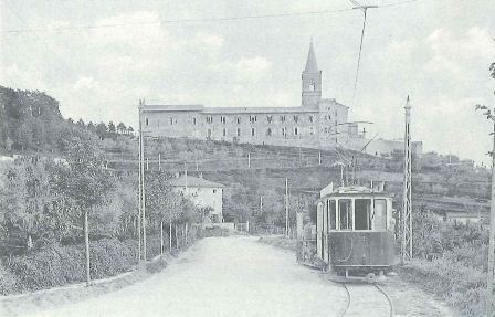 Perugia - Discesa alla stazione